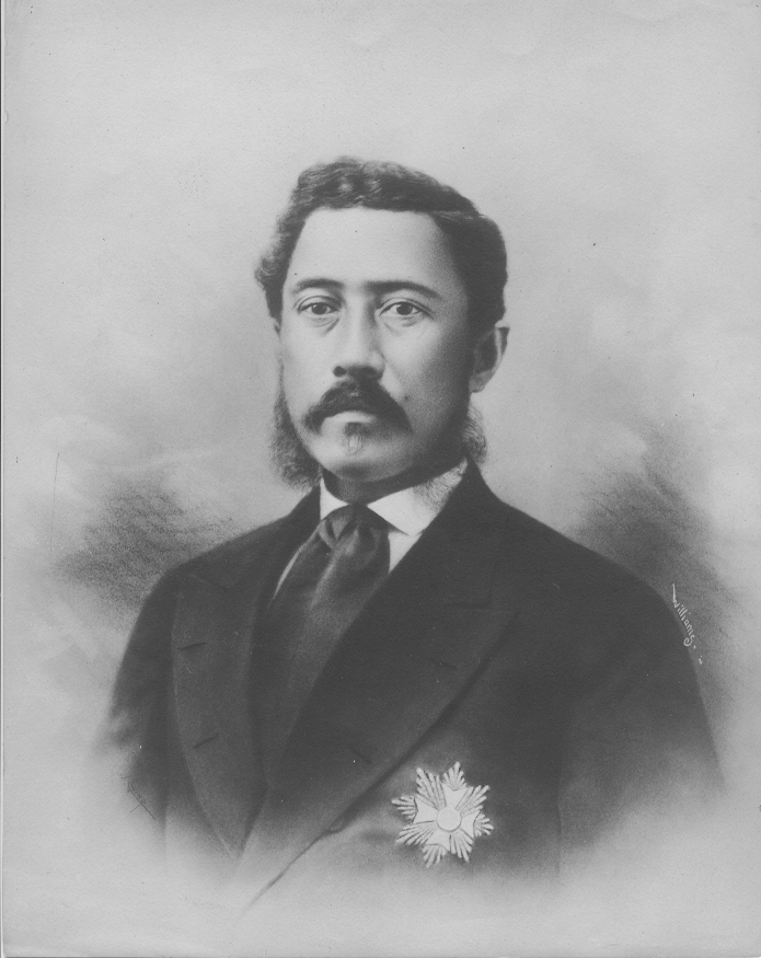 Lunalilo, King of Hawaii 1873–1874